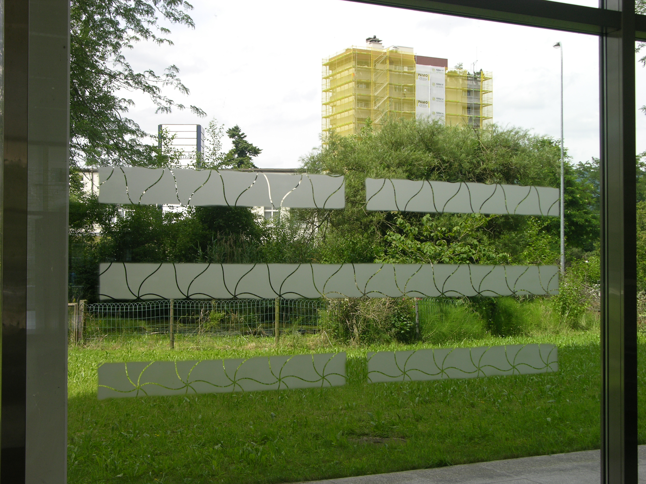 Fensterbild Hugo Suters im ersten Stock des Paul-Karrer-Hauses der Alten Kantonsschule Aarau